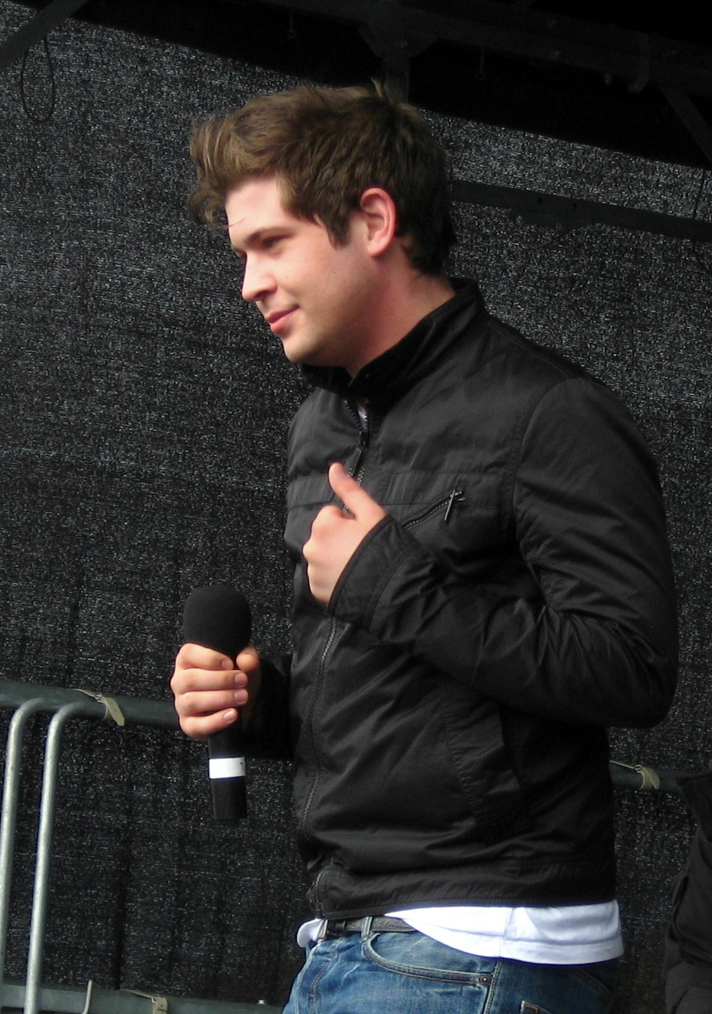 Jon Nørgaard @ Skovmand & Bues Fødselsdag i Hirtshals